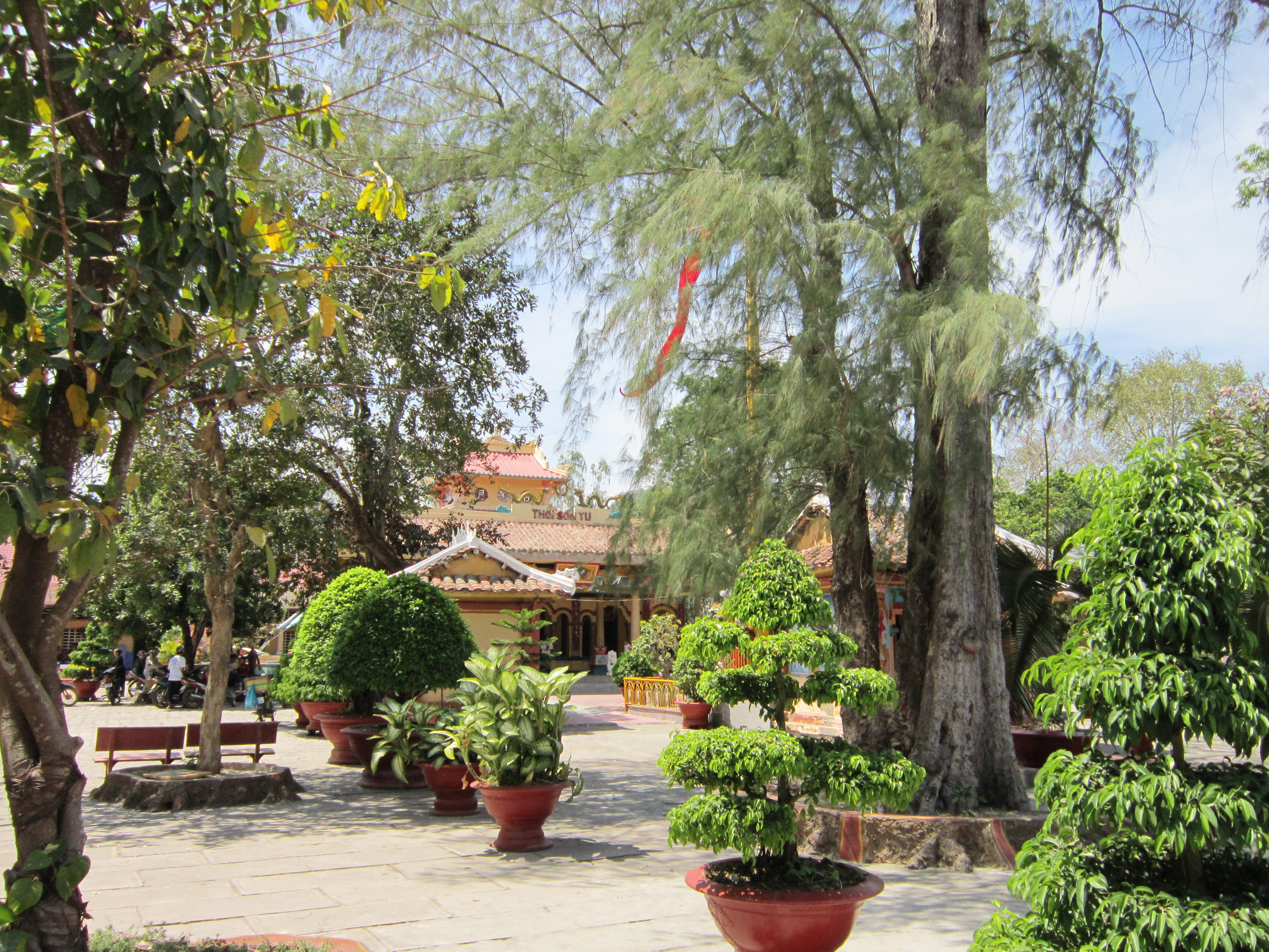 Chùa Thới Sơn ở xã Thới Sơn, huyện Tịnh Biên, An Giang, Việt Nam. Đây được coi như là Tổ đình của đạo Bửu Sơn Kỳ Hương.